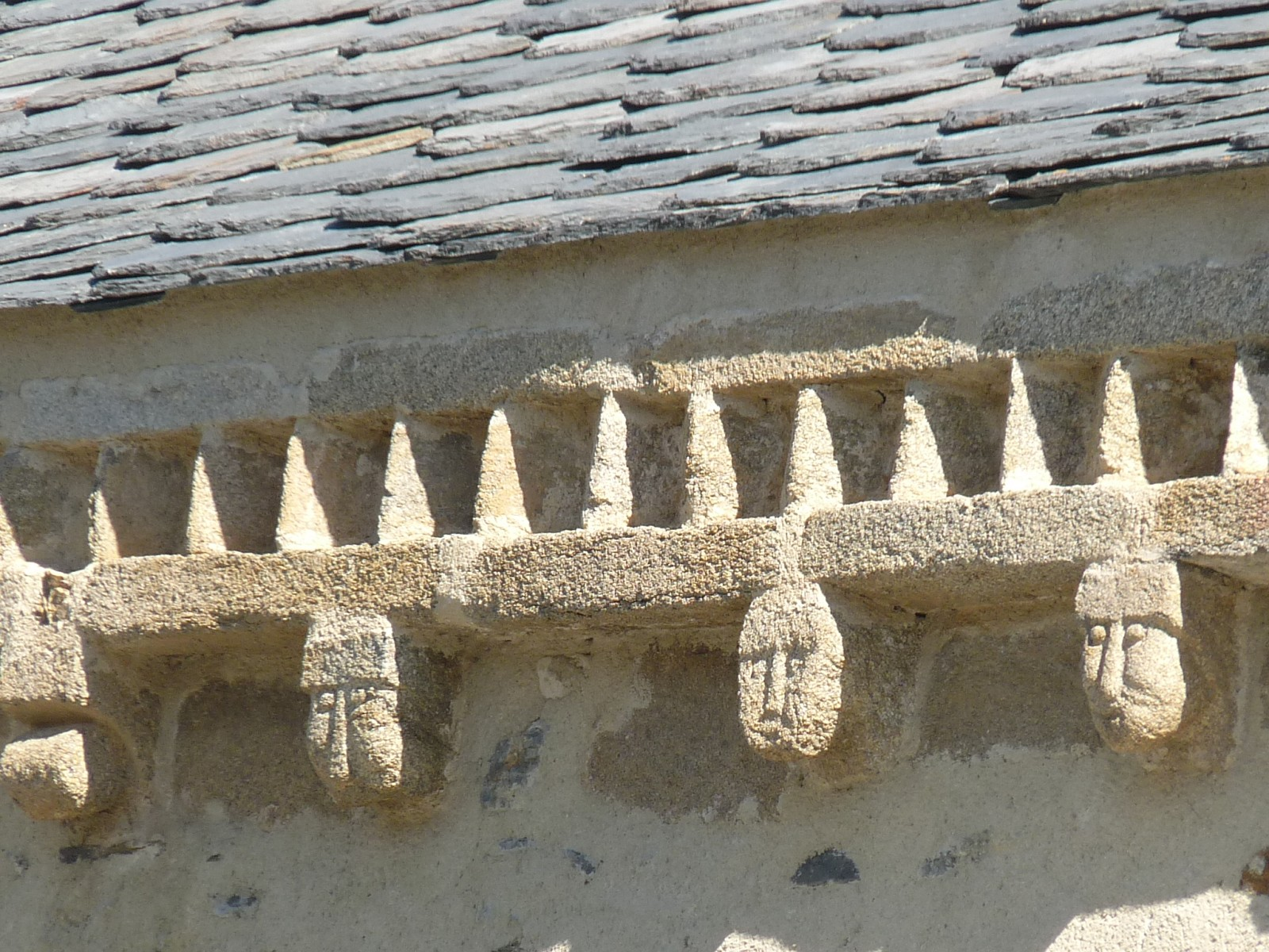 Eglise de Saillagouse, Pyrénées-Orientales, France